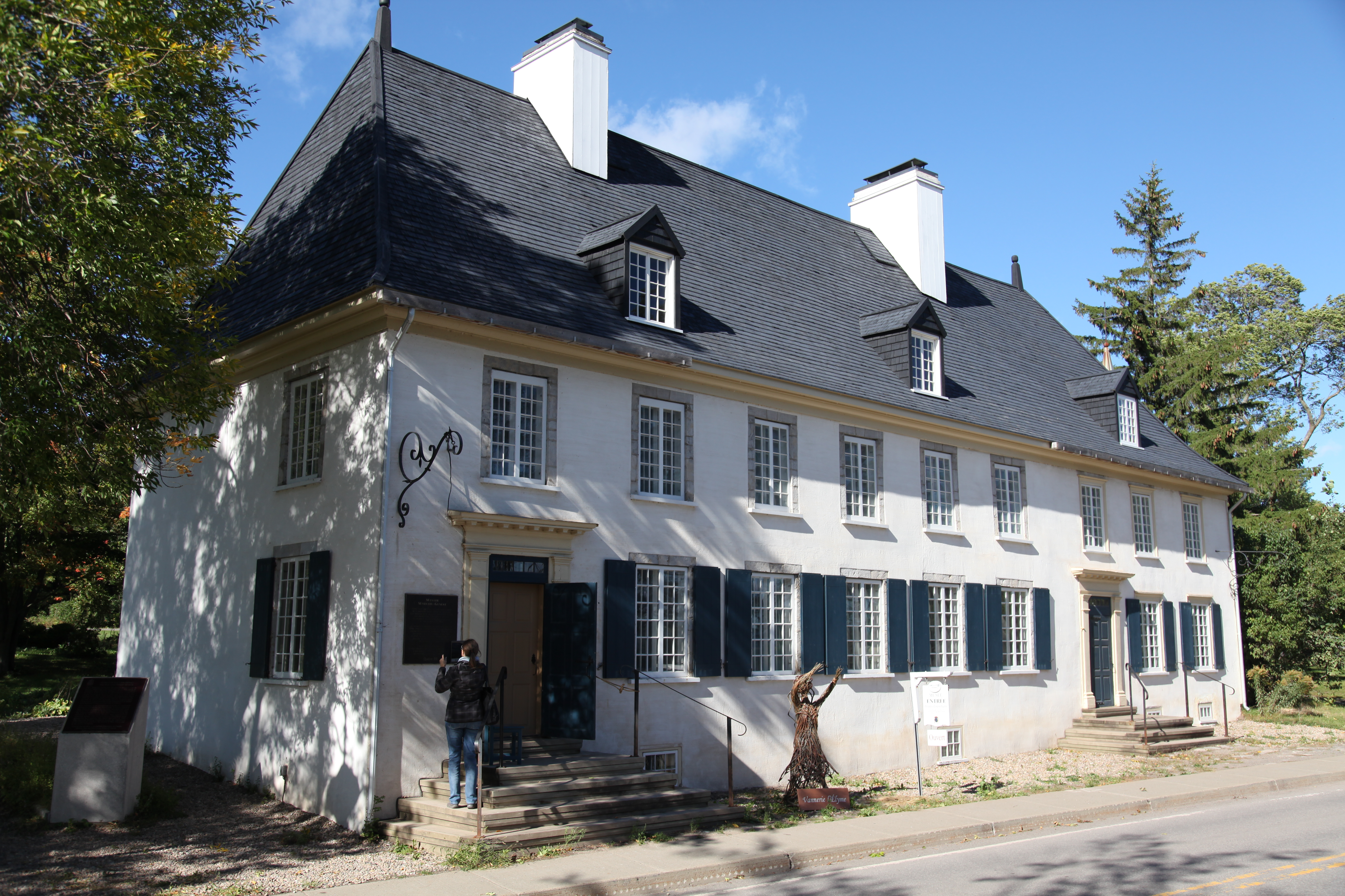 Le lieu historique national du Canada du Manoir Mauvide-Genest est situé sur la rive sud de l’Île d’Orléans au chemin Royal, dans la municipalité de Saint-Jean au Québec. La reconnaissance officielle fait référence au bâtiment et à son lot cadastral. Le manoir Mauvide-Genest est un exemple particulièrement remarquable des manoirs seigneuriaux édifiés en contexte rural vers le milieu du XVIIIe siècle. Avec l’ancienne seigneurie de l’Île d’Orléans, le manoir témoigne aussi de l’importance historique nationale du régime seigneurial sous le Régime français. La valeur patrimoniale du manoir Mauvide-Genest tient à la forme, aux matériaux et au cadre rural de sa résidence, associés au XVIIIe siècle, et à son illustration de la subdivision des terres sous le régime seigneurial français. De par sa taille, la proximité du fleuve Saint-Laurent et d’un ruisseau, ainsi que l’accès à un lot boisé, la propriété possède toutes les caractéristiques d’une seigneurie rurale le long du Saint-Laurent. La propriété du manoir Mauvide-Genest a été créée 1734 à partir d’un domaine appartenant à Charles Genest. Elle servit comme résidence à son petit-fils Jean Mauvide, chirurgien du Roi, marchand et de 1752 à 1779, seigneur de l’Île d’Orléans. Au moment de la construction, la façade de la résidence, orientée vers le sud, dominait un jardin et le fleuve. L’embourgeoisement du terrain et du manoir au XVIIIe siècle semble cependant attribuable à un propriétaire ultérieur.